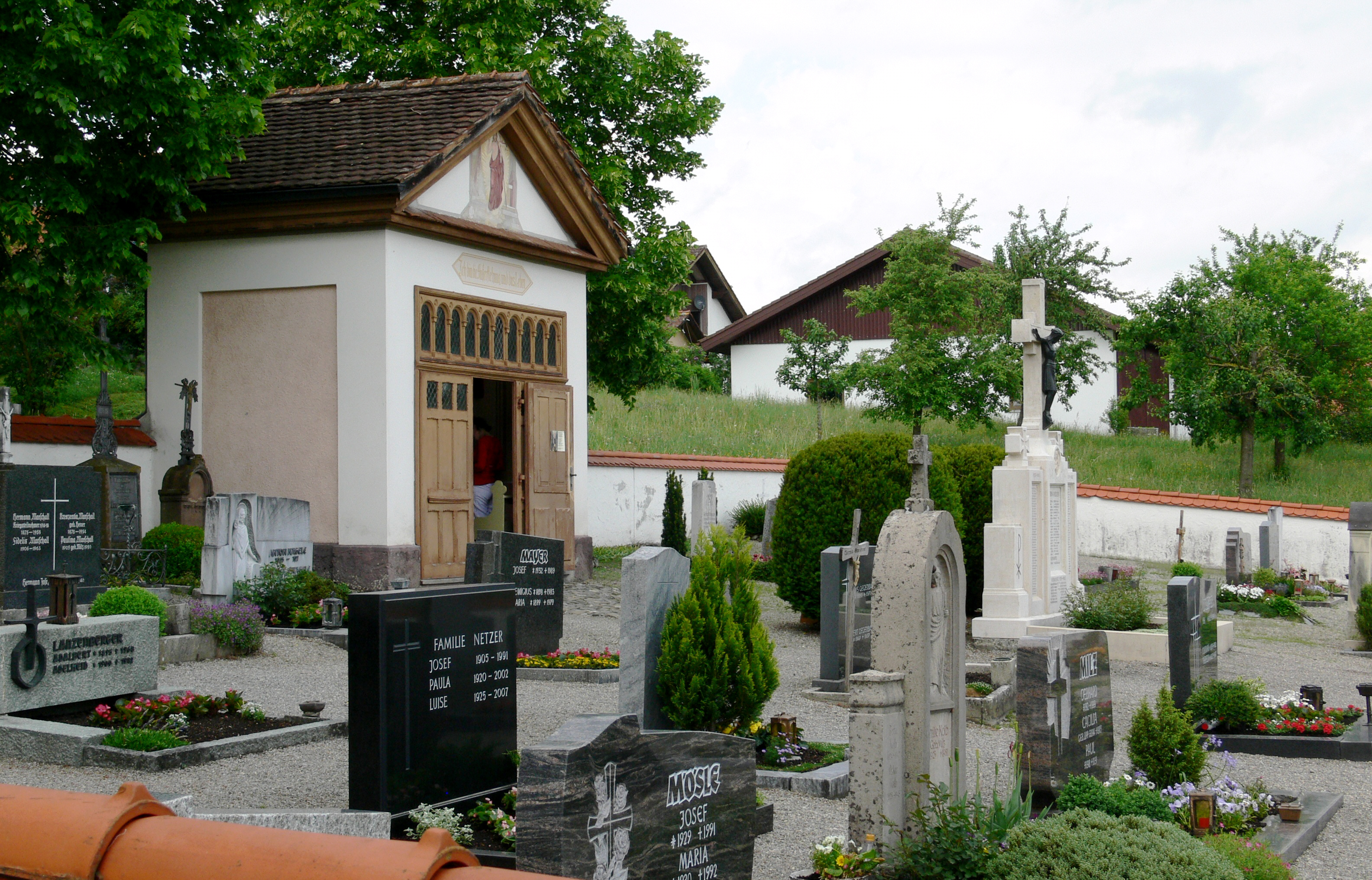 Friedhof Merazhofen, Stadt Leutkirch im Allgäu, Landkreis Ravensburg Friedhofskapelle